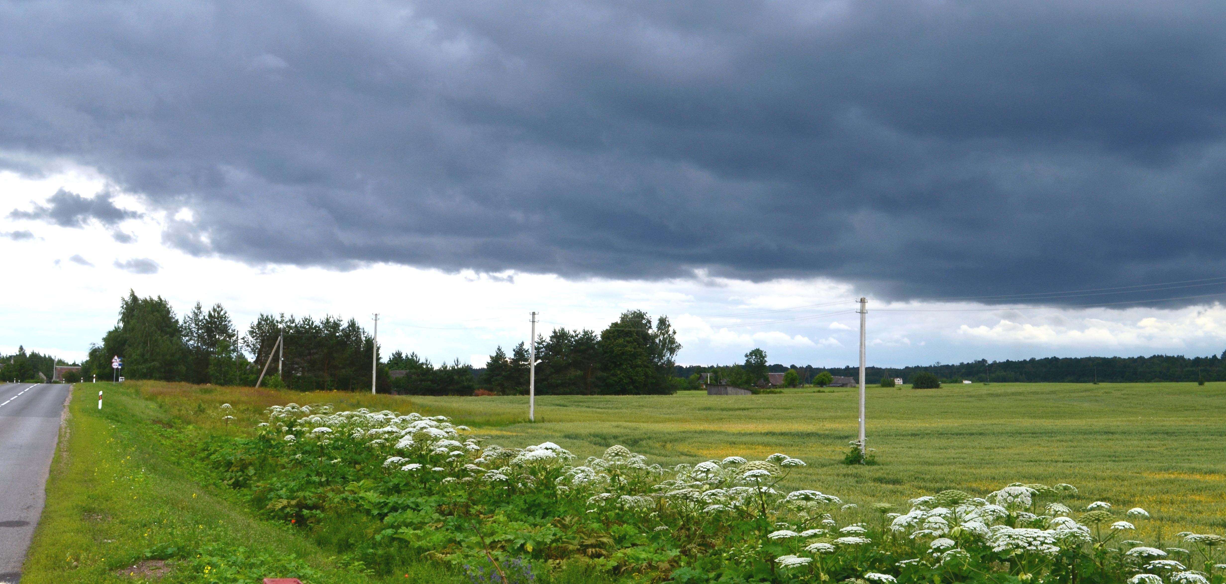 Bitvanas, Kauno raj.